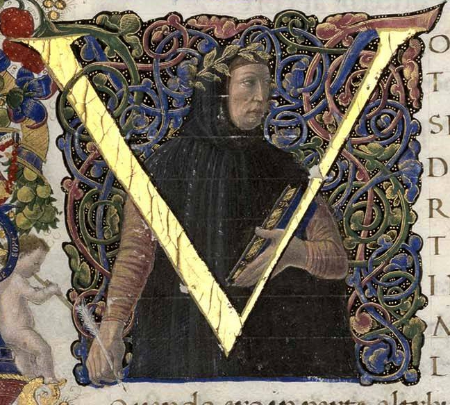 Manuscrito de escuela florentina (manu Matthaei domini Herculani de Vulterris) de las obras de Petrarca. Realizado para el primer duque de Urbino Federico III de Montefeltro (1444-1482). Contiene las Rimas y los Triunfos.